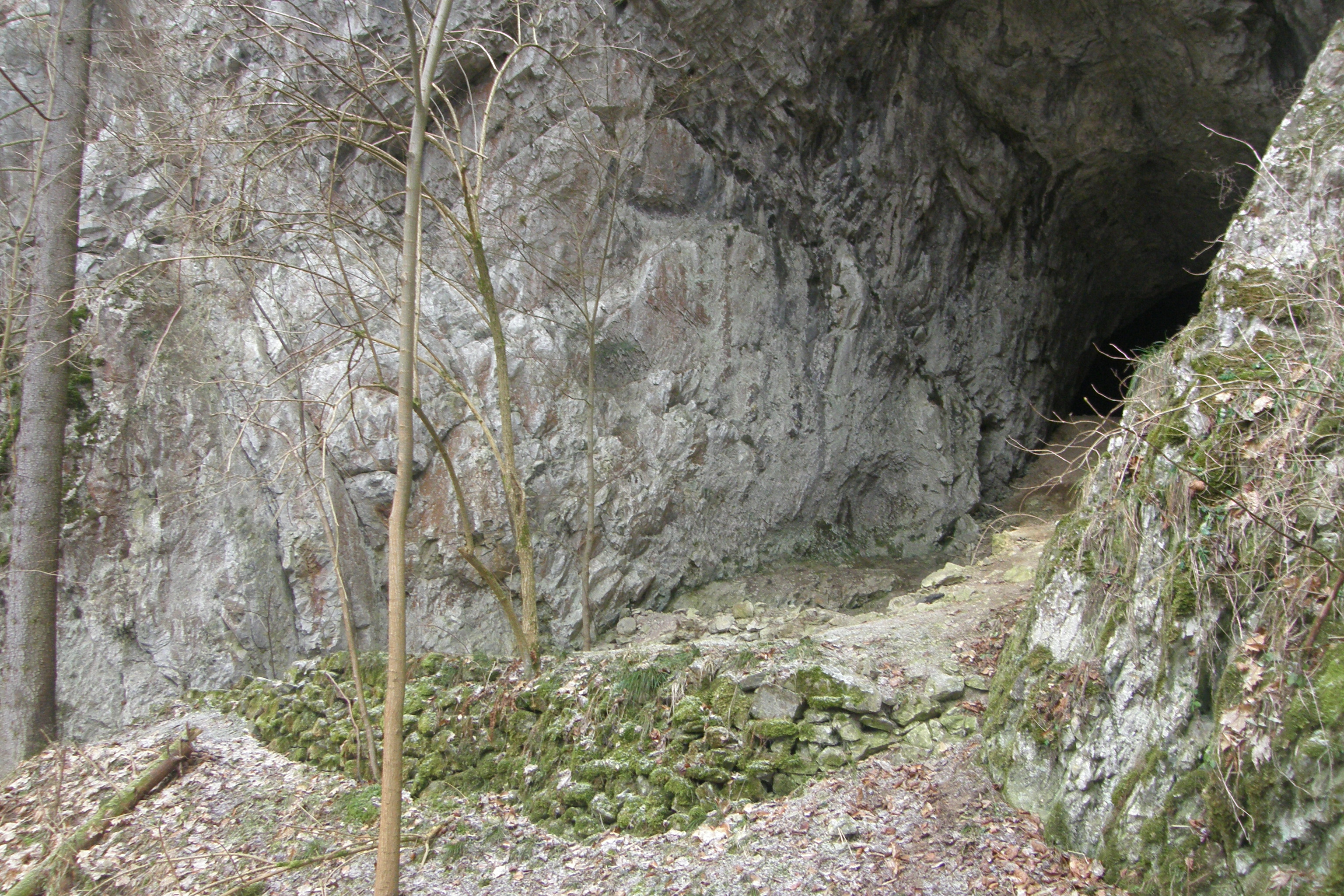 Rytířská jeskyně v Suchém žlebu v Moravském krasu